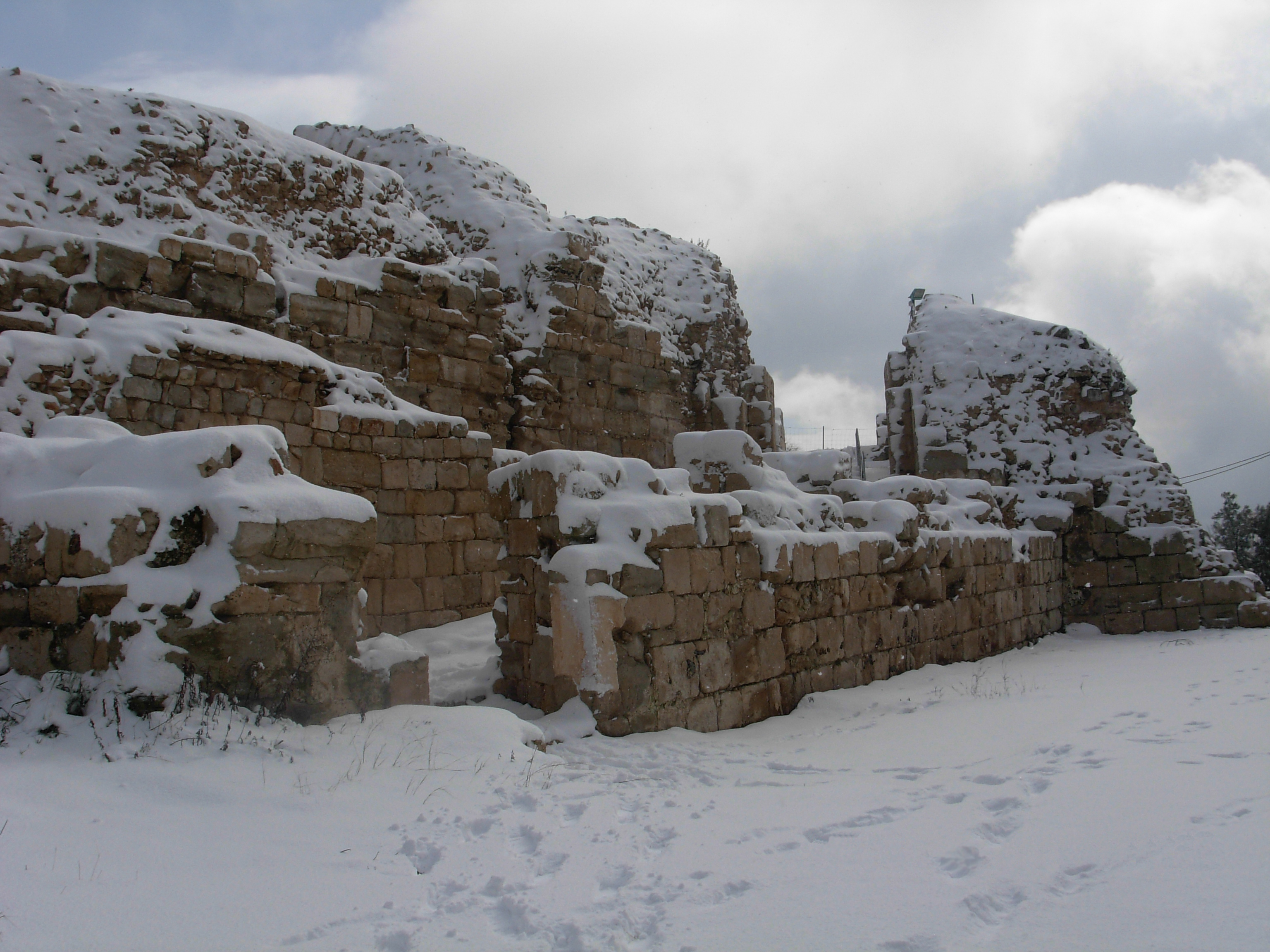 מצודת צפת מבשלג(חורף 2008)י